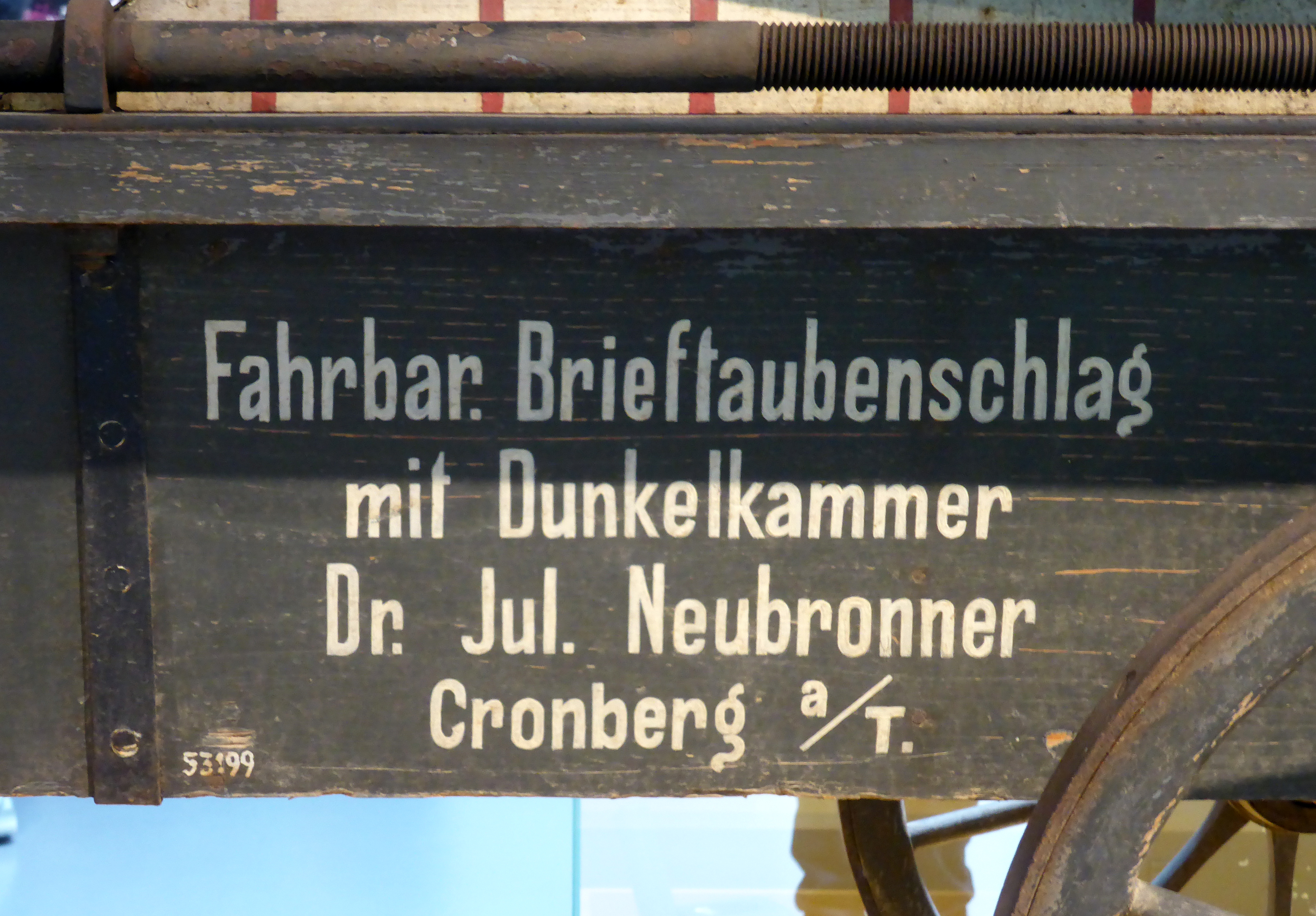 Fahrbarer Brieftaubenschlag im Deutschen Technikmuseum in Berlin. Wikipedianische KulTour am 10. Oktober 2015 in der Ausstellung des Museums.